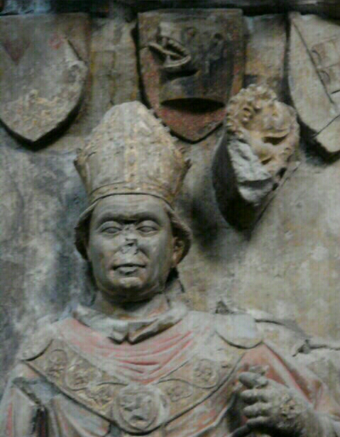 Darstellung des Fürstbischofs Johann von Egloffstein auf seinem Epitaph im Würzburger Dom